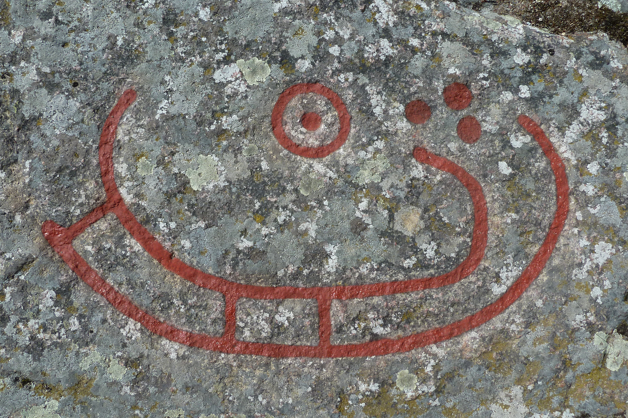 Felsritzungen Madsebakke auf Bornholm: Schiff, Schalengruben